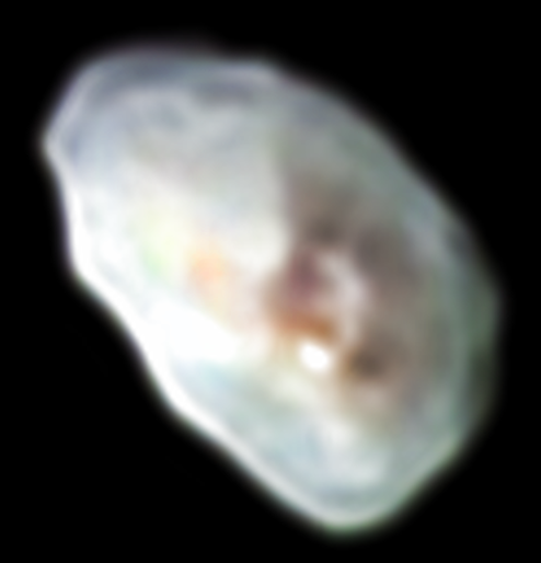 Nix in Farbe. Bild aufgenommen von New Horizons am 14. Juli 8:05. Kammera: RALF (s/w) und LORI (blaut, rot, nahinfrarot, methan)